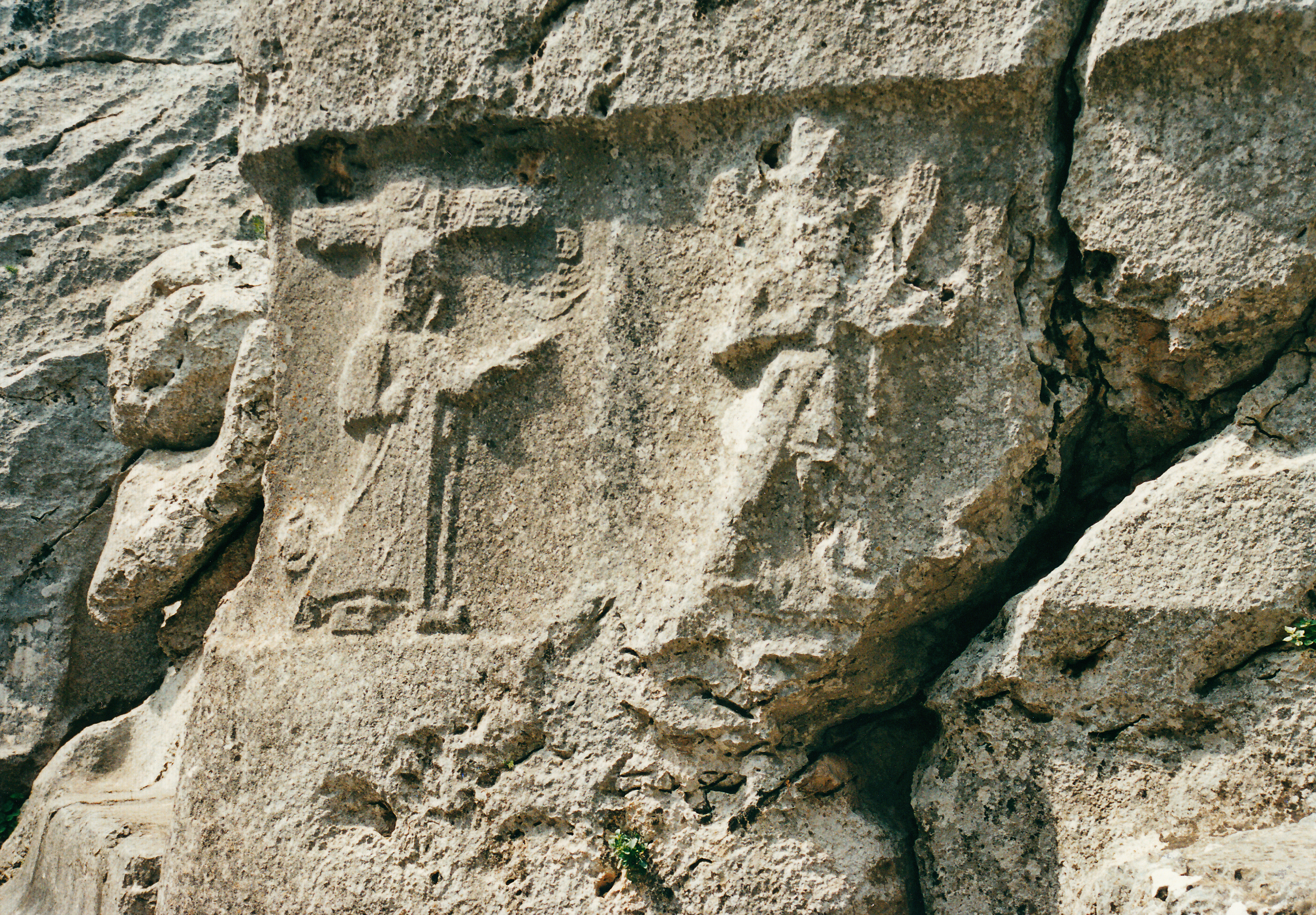 Yazılıkaya Reliefs 34 und 35, Sonnengott des Himmels und Mondgott